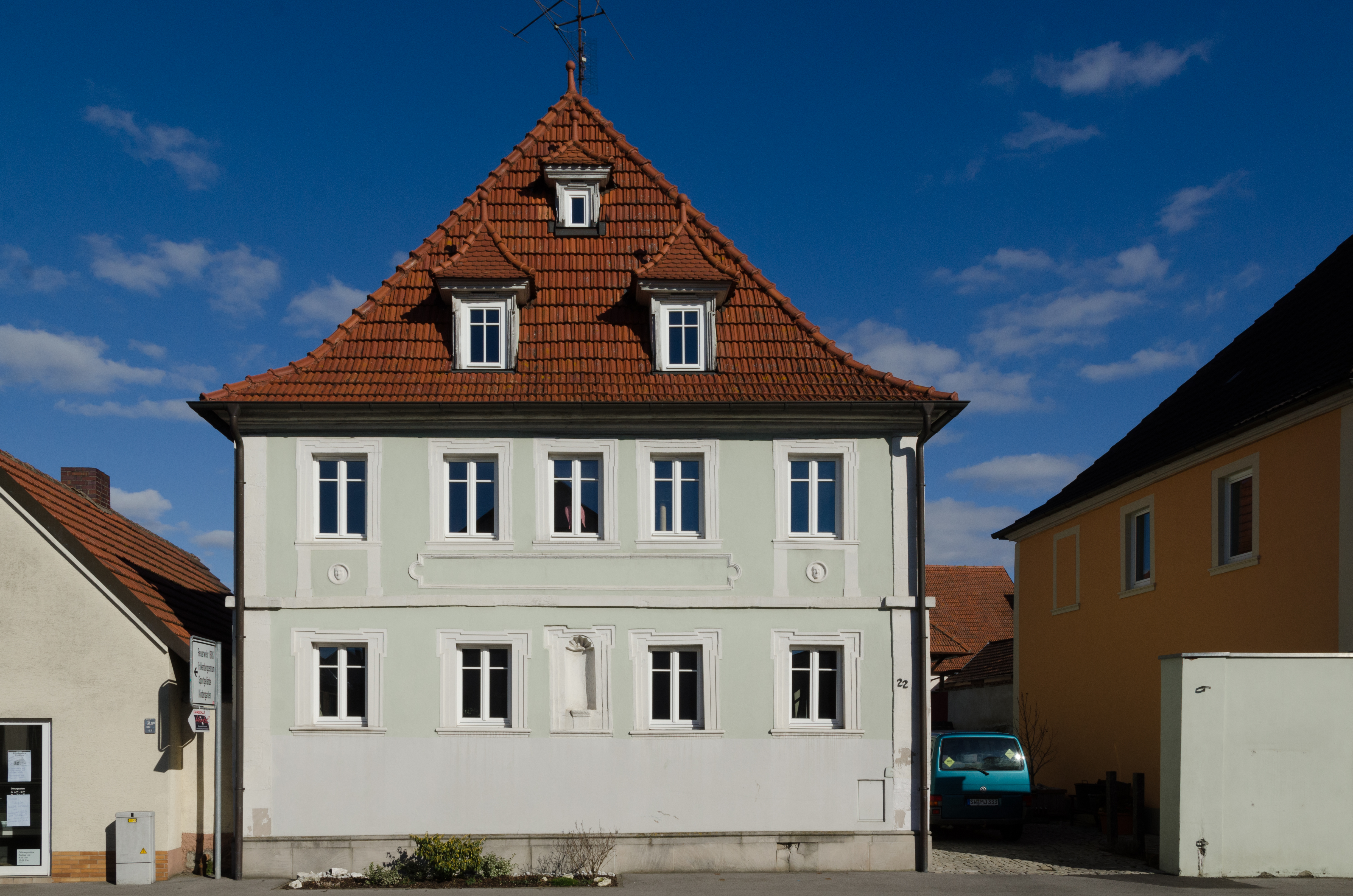 Donnersdorf, Hauptstraße 22